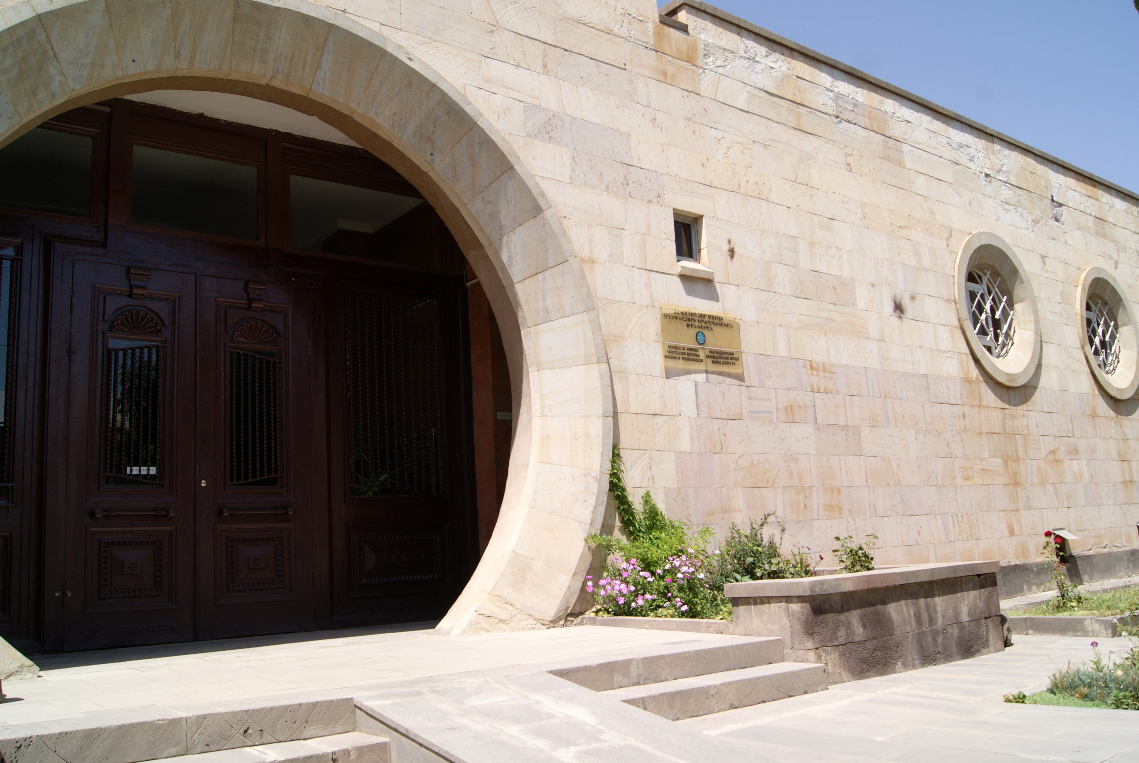 Թանգարանի շենք. Վայոց Ձորի երկրագիտական թանգարանը 1/8